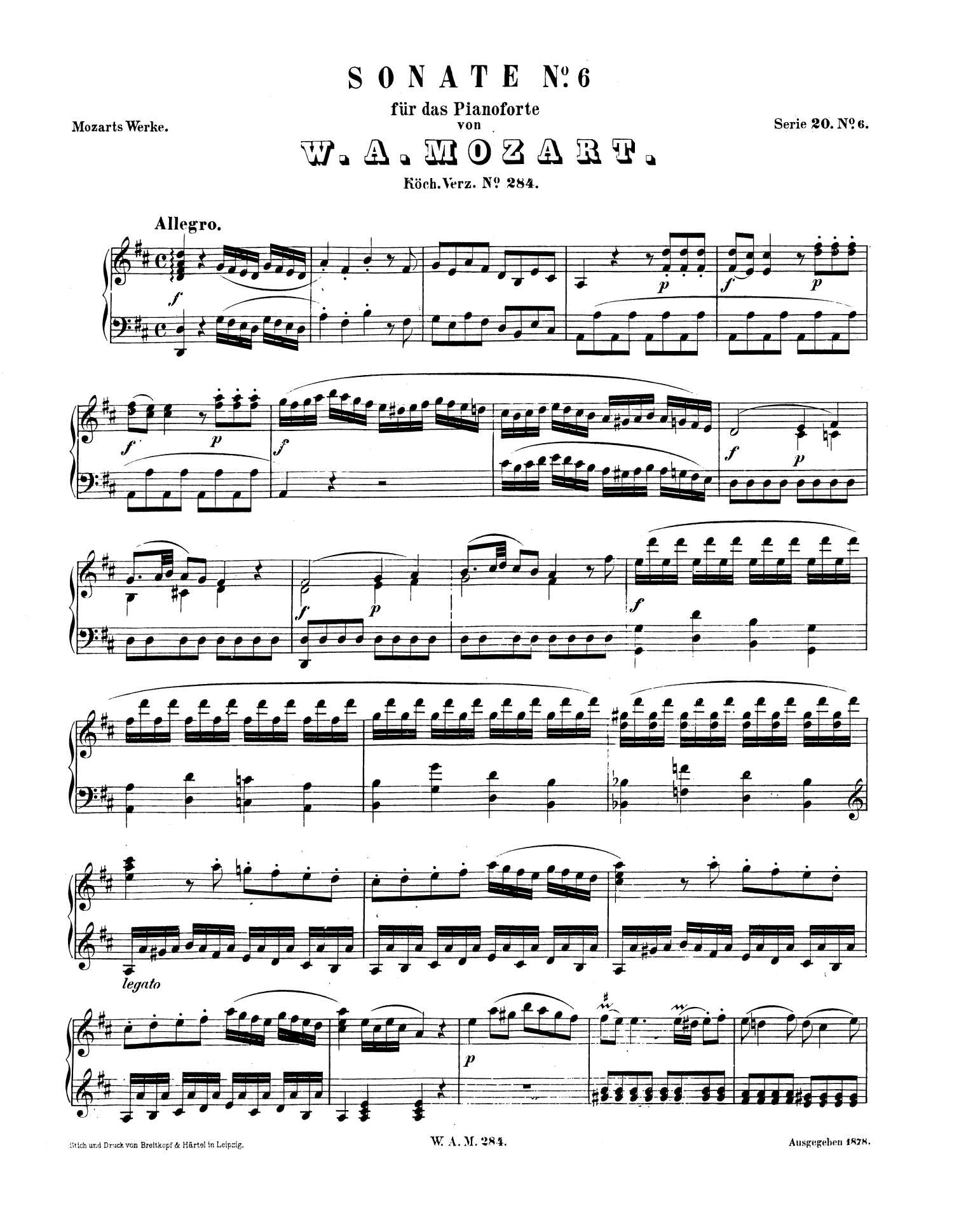 Édition de la Sonate pour piano nº 6 de Mozart, « 'Durnitz' », chez Breitkopf & Härtel dans Wolfgang Amadeus Mozarts Werke (1878)